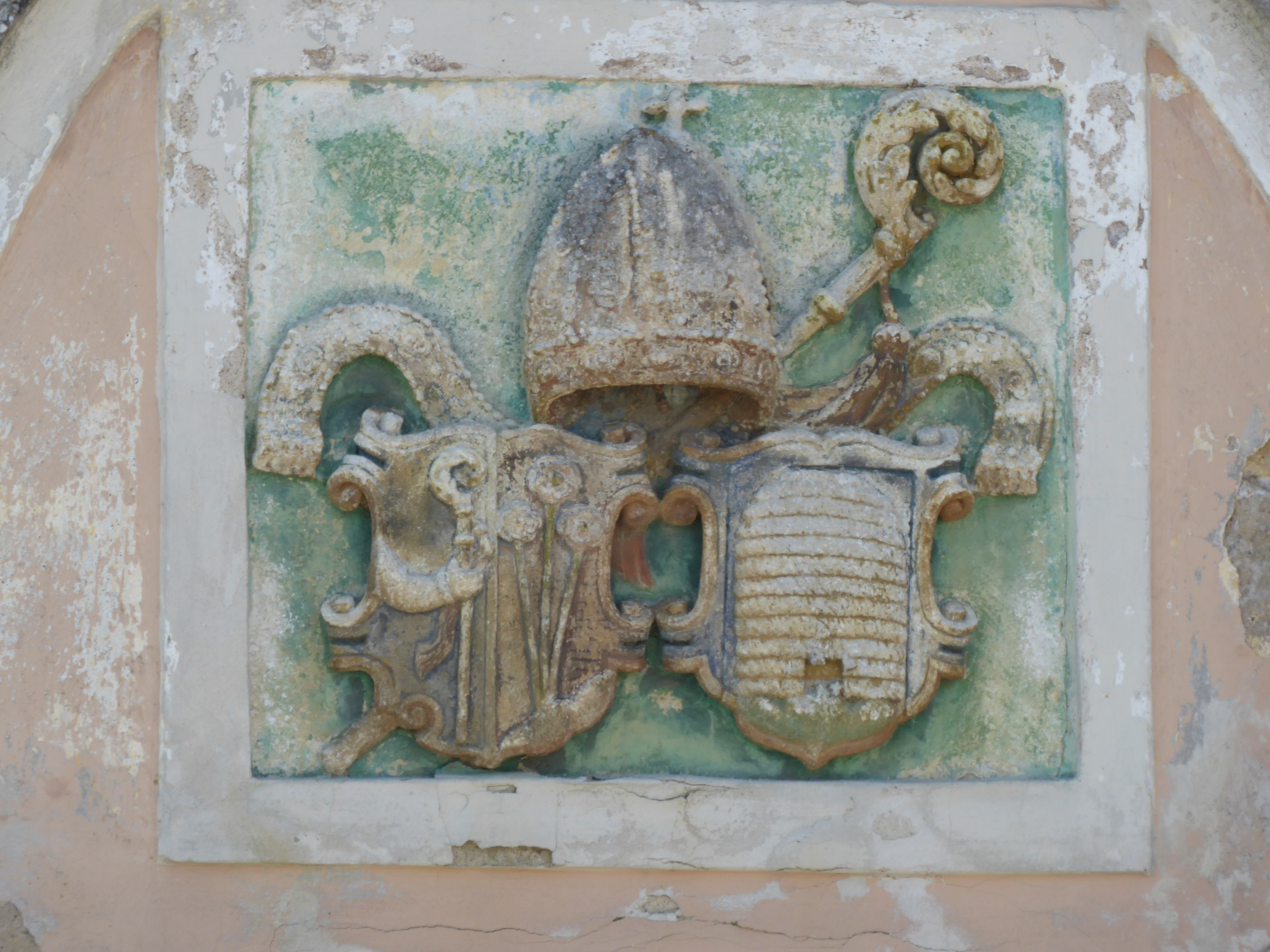 Altenburger Stiftshof, Zöbinger Hauptstraße 39, Zöbing, Langenlois, Niederösterreich - Wappen von Abt Placidus Much, Altenburg, über dem Portal